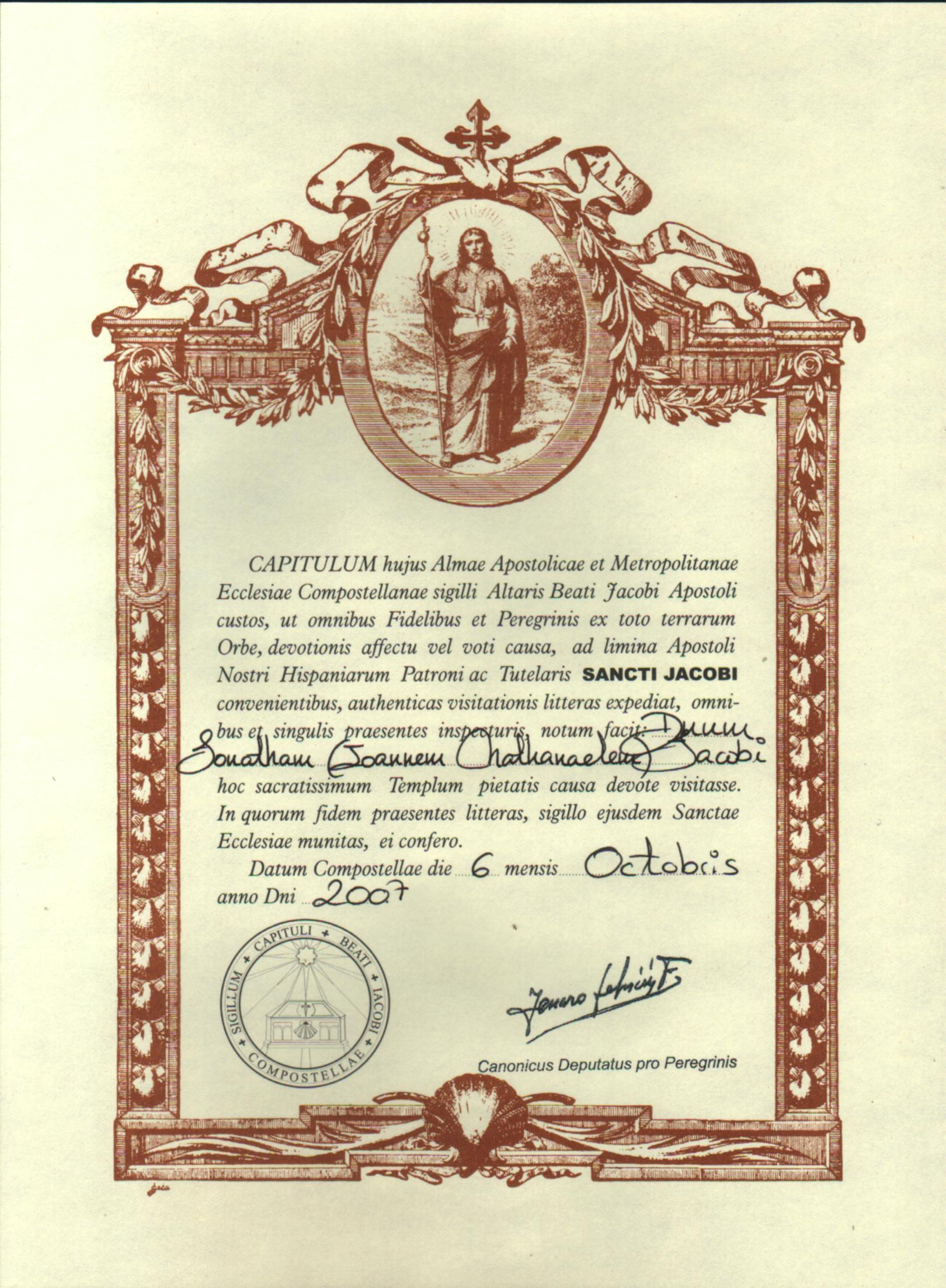 קומפוסטלה